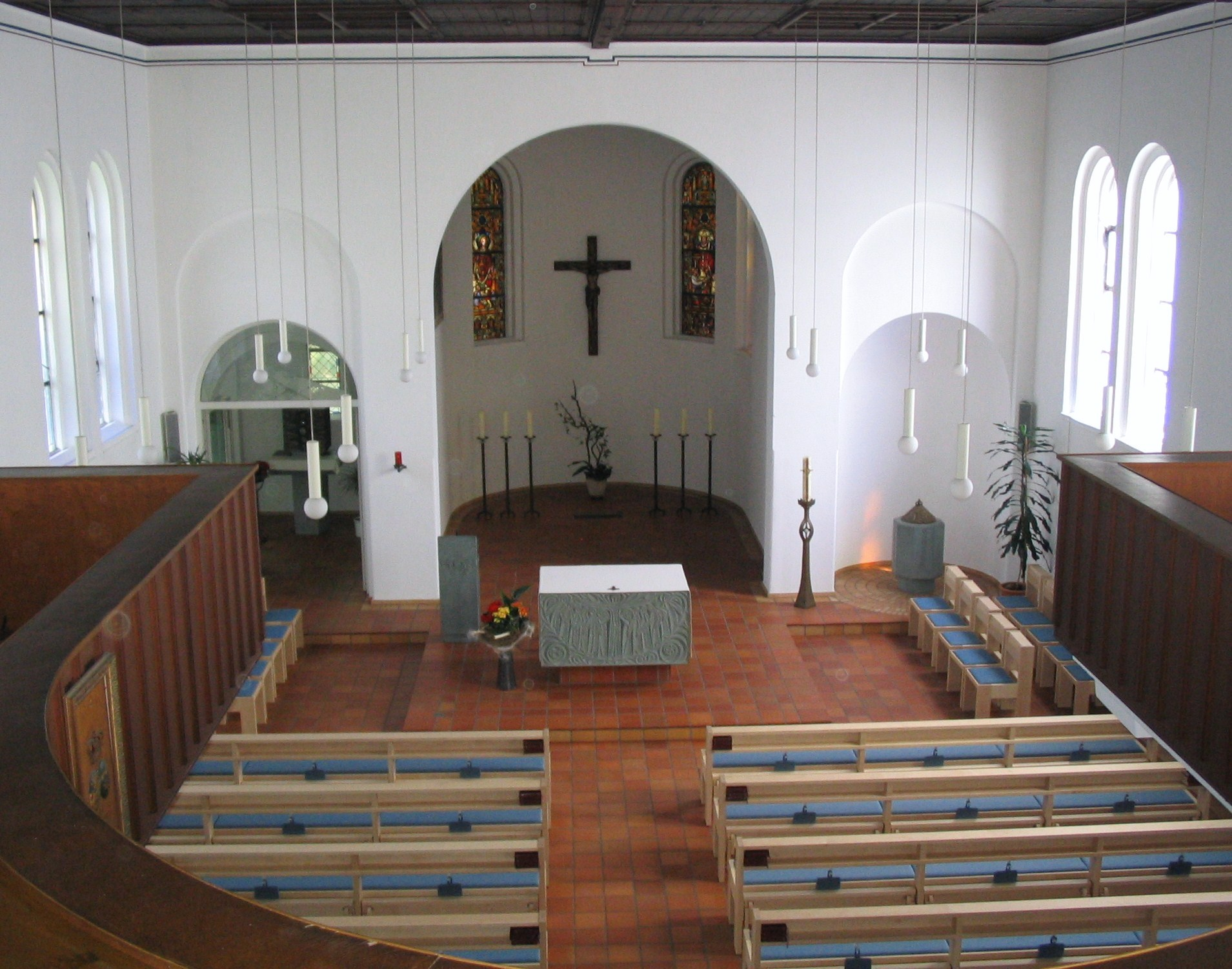 Kath. Kirche "Zu den heiligen Schutzengeln", Juist, Innenraum von der Empore, Querformat